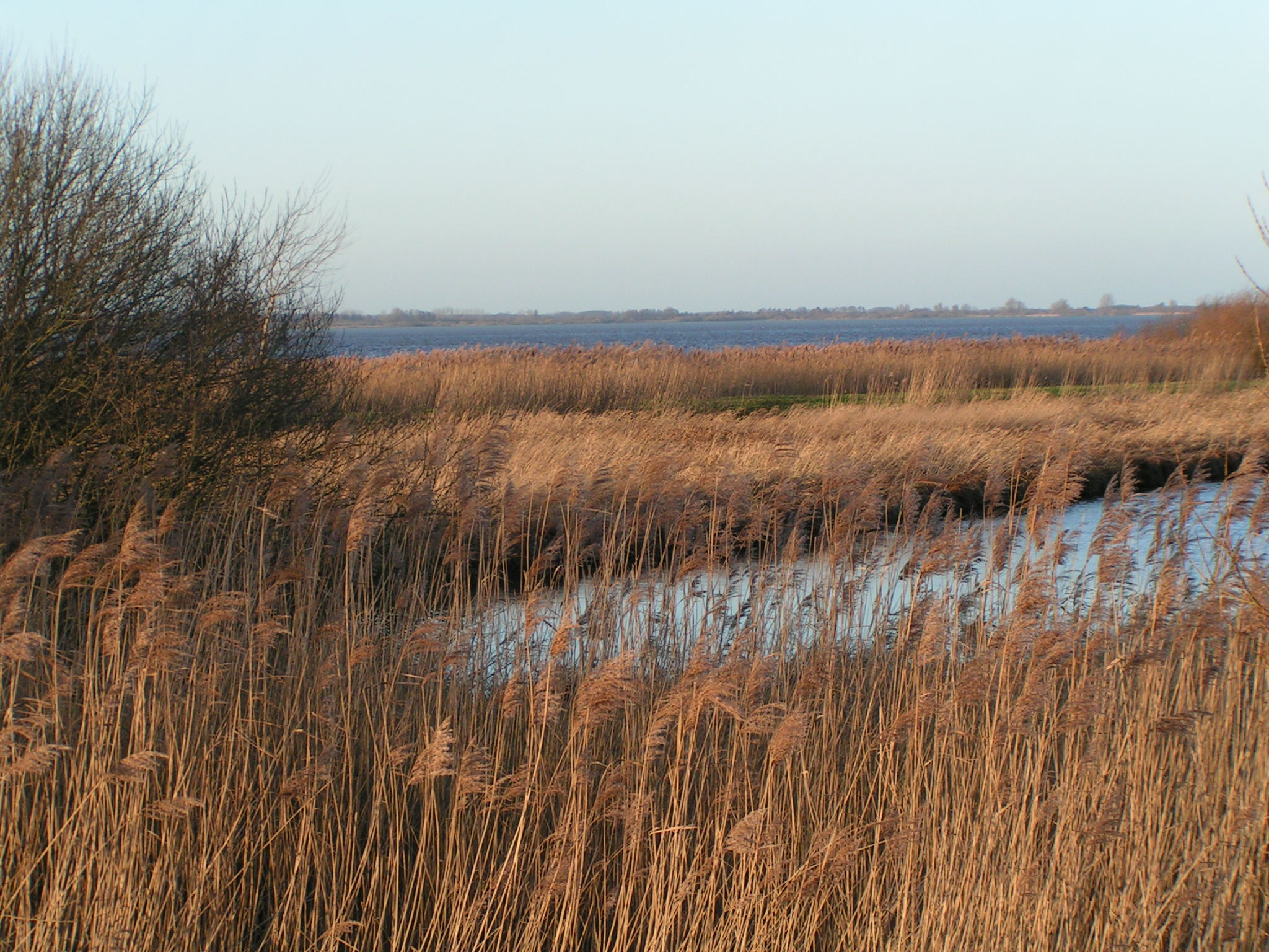 Schilfgürtel am Südufer des Dümmers